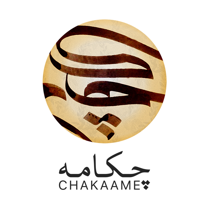 لوگوی چکامه